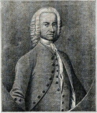 «Carl Deichman. Efter et Originalmaleri i det Deichmanske Bibliothek.»